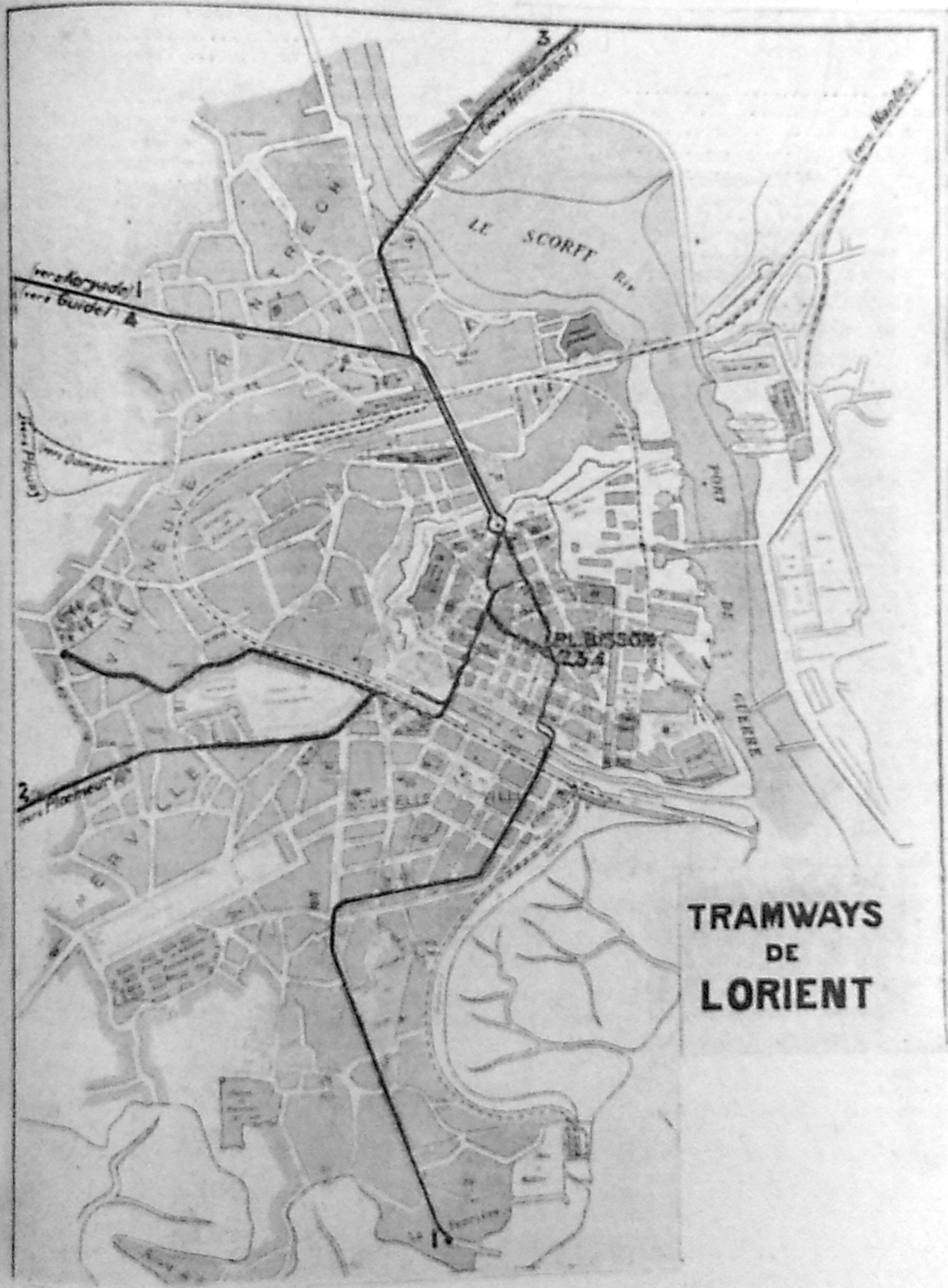 Plan du tramway de Lorient en 1928